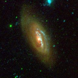 Messier 90 galaxy